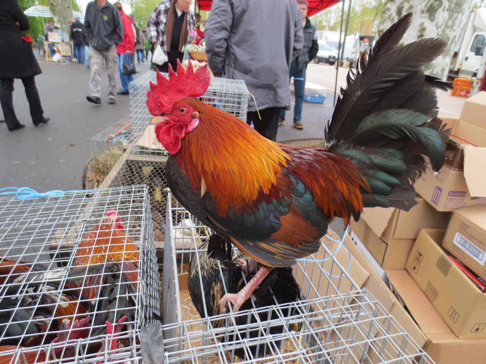 Markets in Louhans